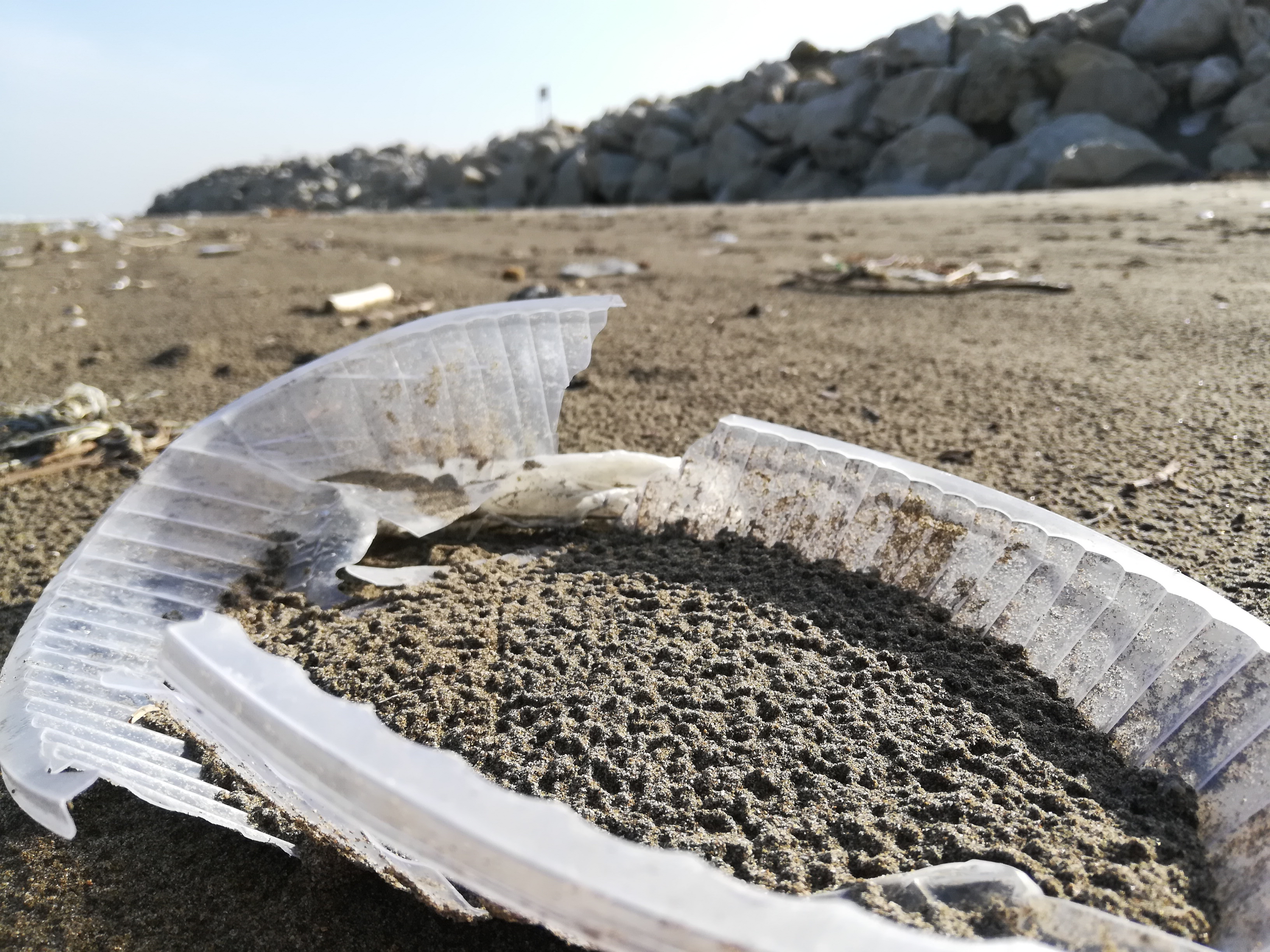 Pollution of the coast of Bandar Anzali, Iran with plastic containers. Photographer: Shayan Sheydaei